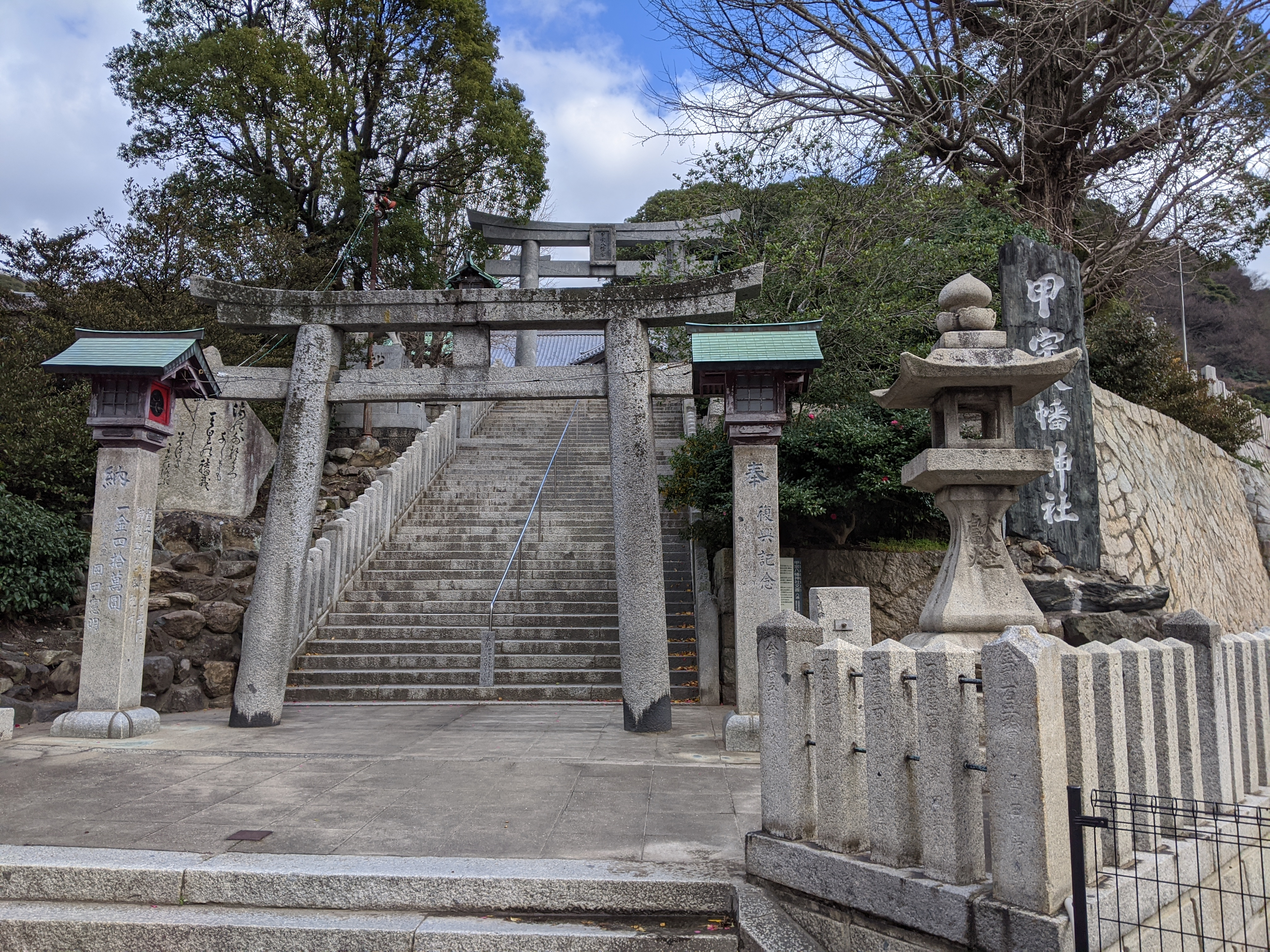 甲宗八幡神社の入口（北九州市門司区）